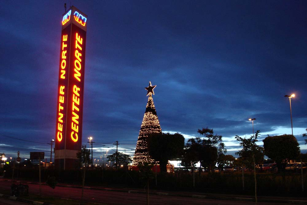 O Shopping Center Norte em São Paulo.